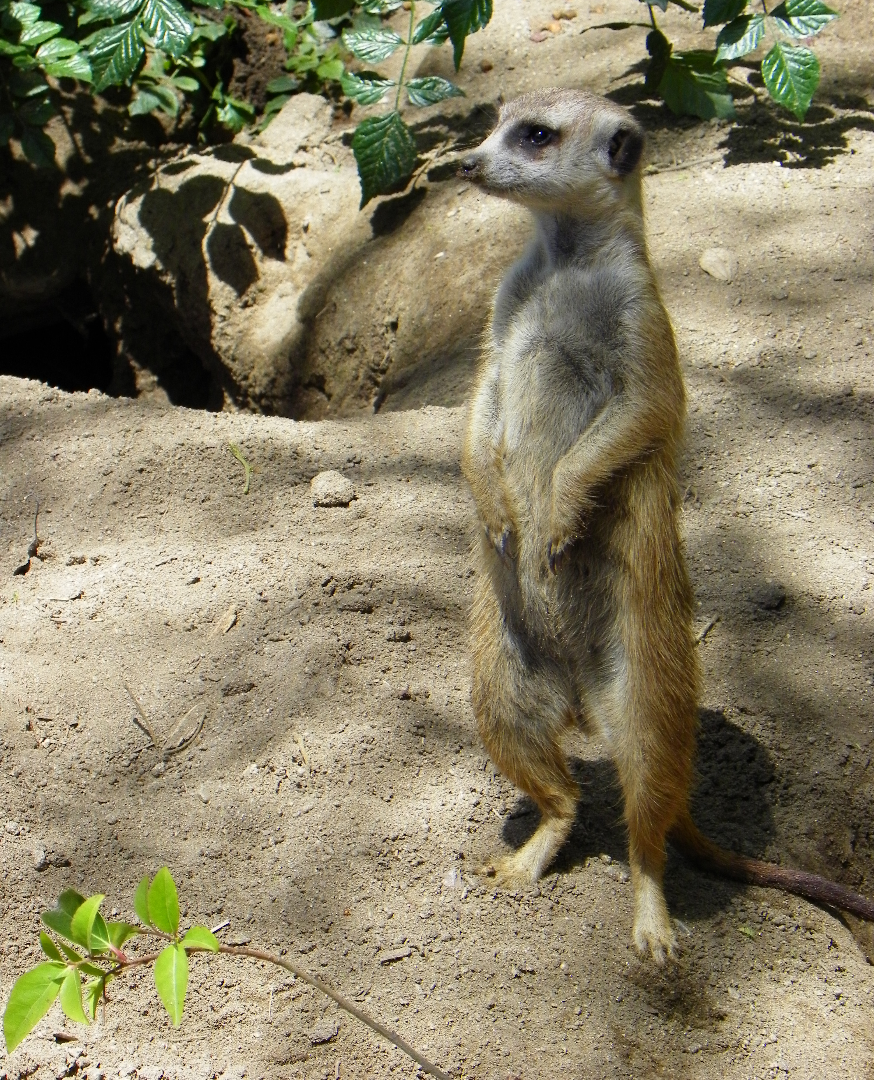 A standing meerkat at the San Diego Zoo.